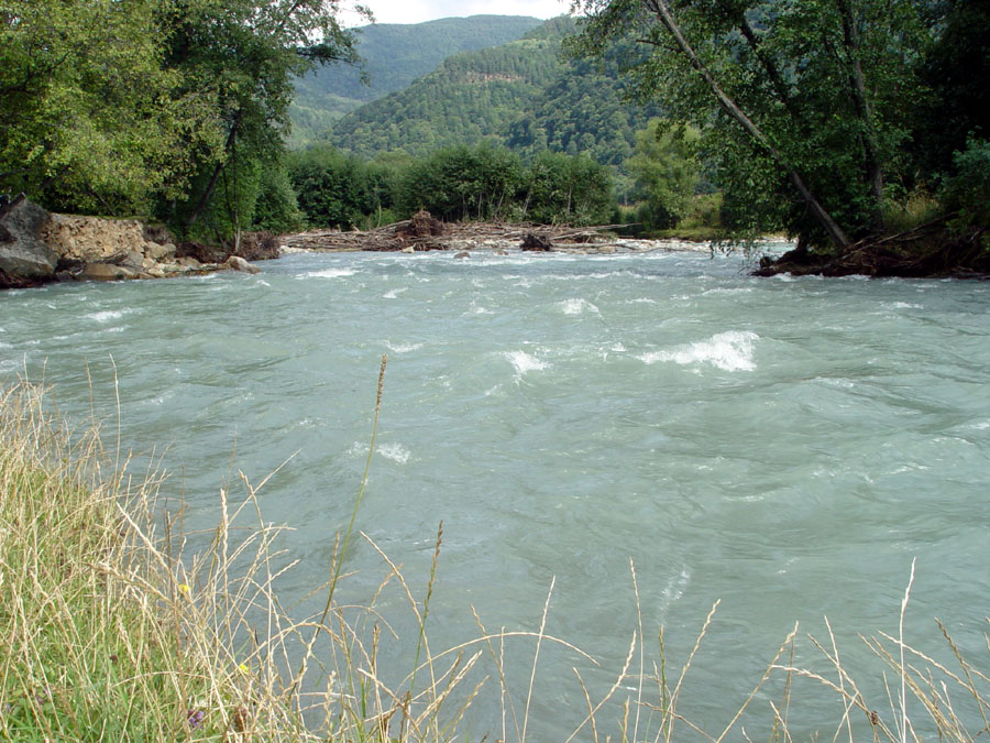 Bolshoi Zelenchuk river Река Большой Зеленчук